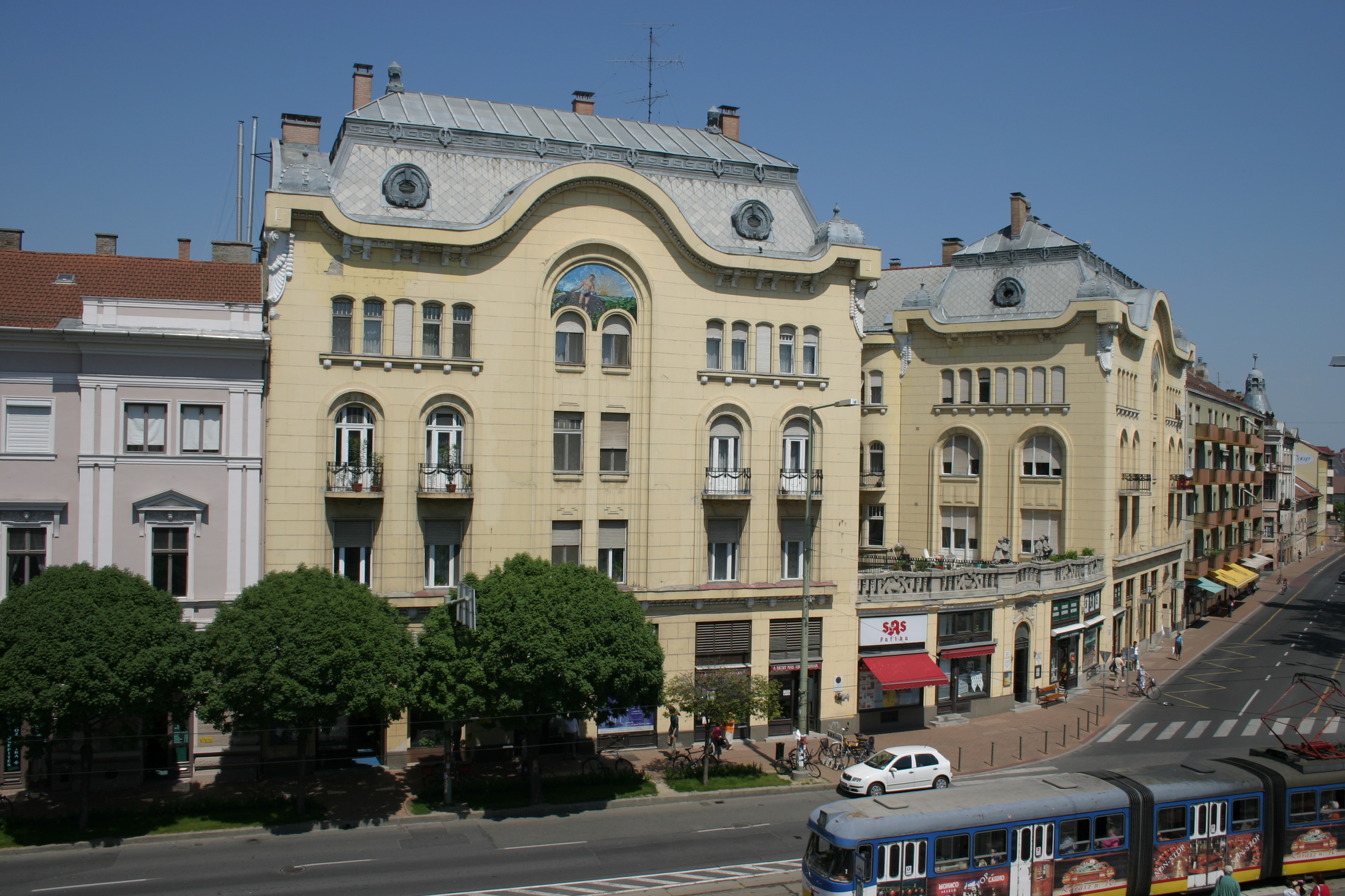 Református Palota, Szeged